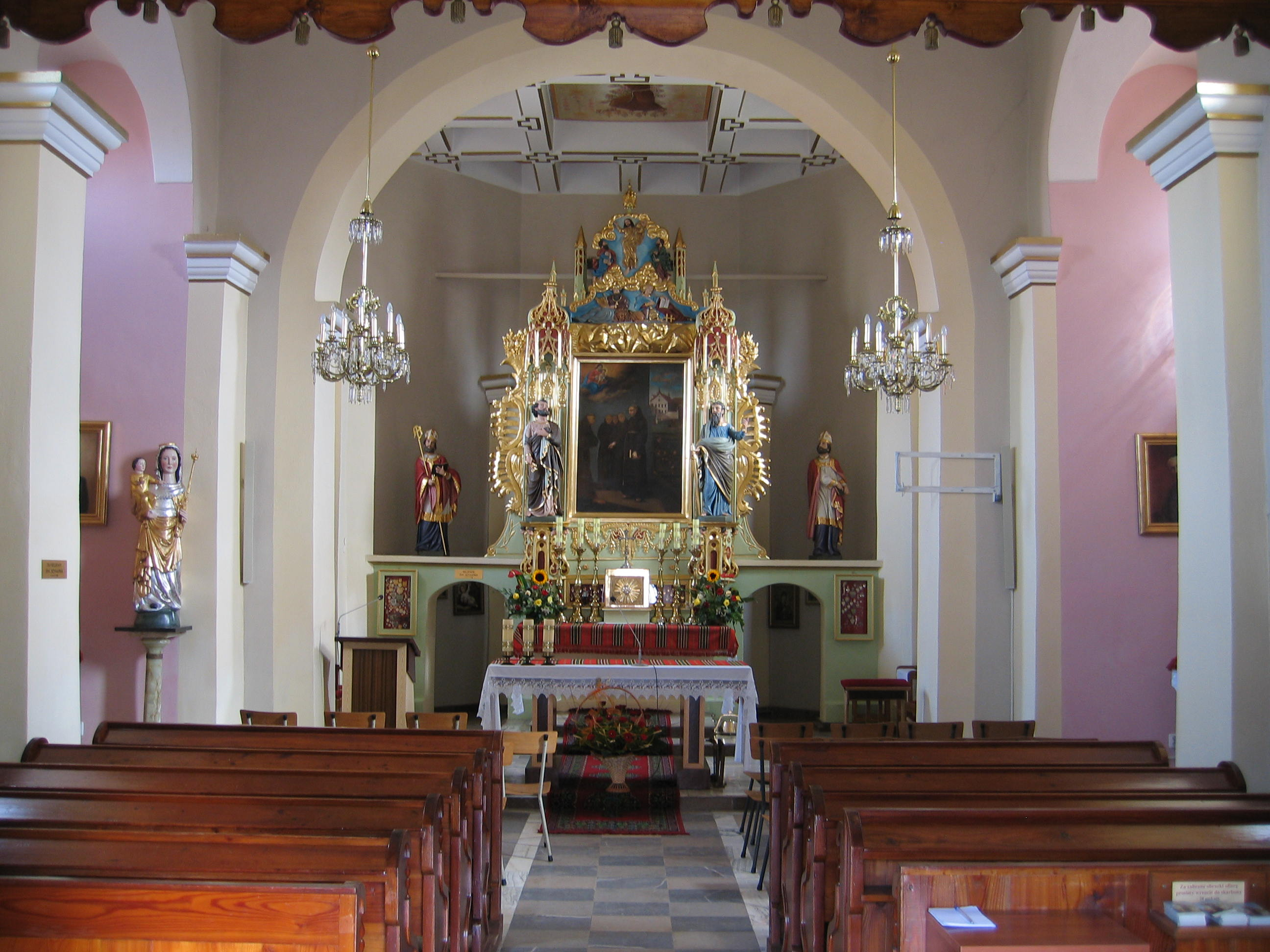 Lipnica Murowana - rzymskokatolicki kościół filialny pw. bł. Szymona z Lipnicy, XVII (wnętrze)